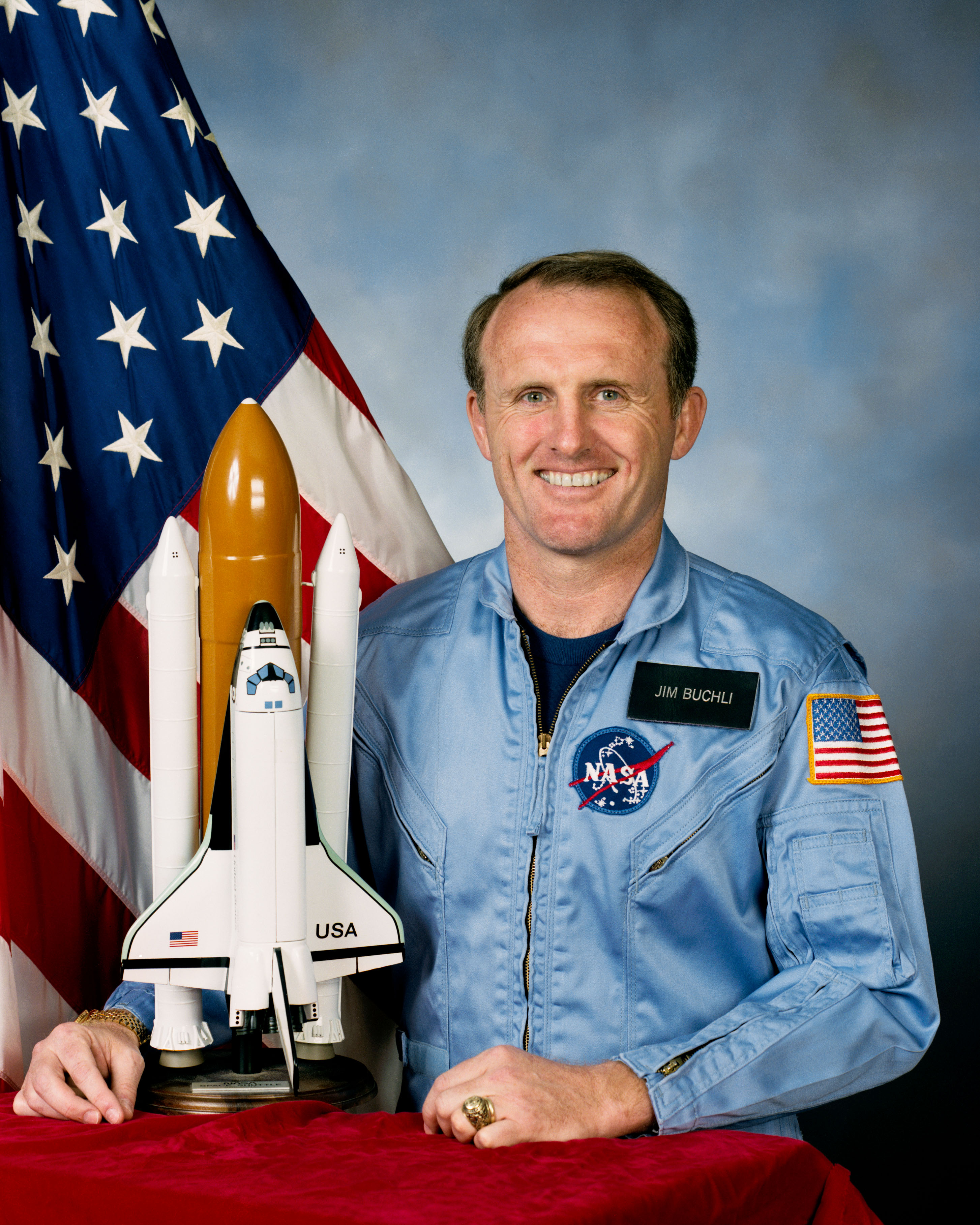 portrait astronaut James Buchli